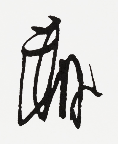 Minamoto no Yoritomo's signature (kaō)